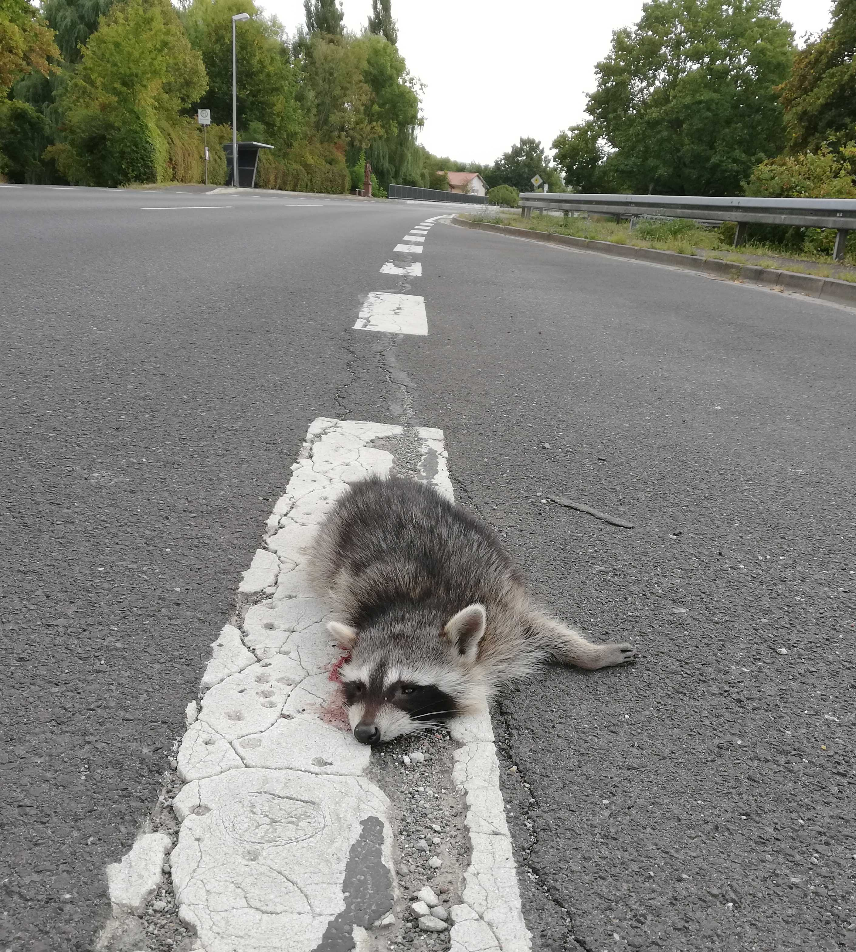 verendeter Waschbär liegt auf der Straße